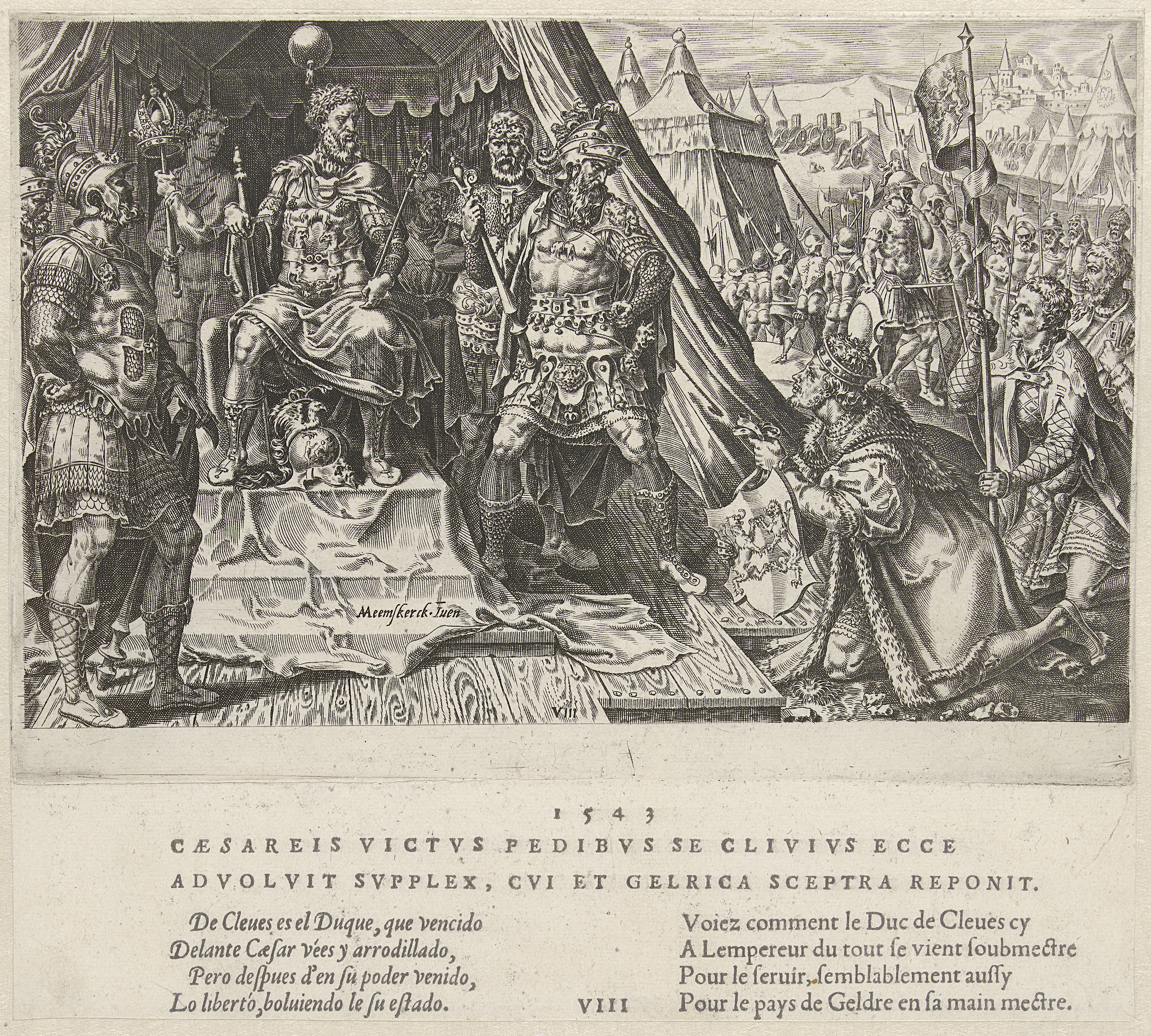 Vrede van Venlo